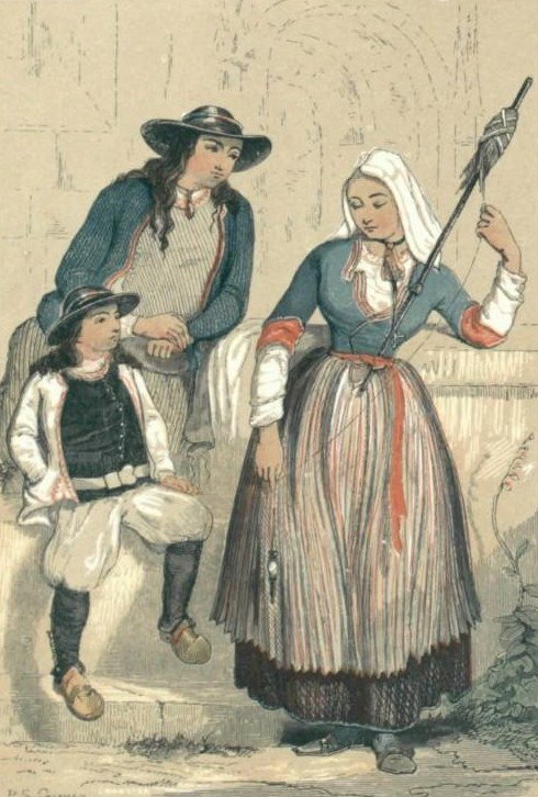 Briec : habitants en costume (dessin de 1844 dans "La Bretagne" de Jules Janin